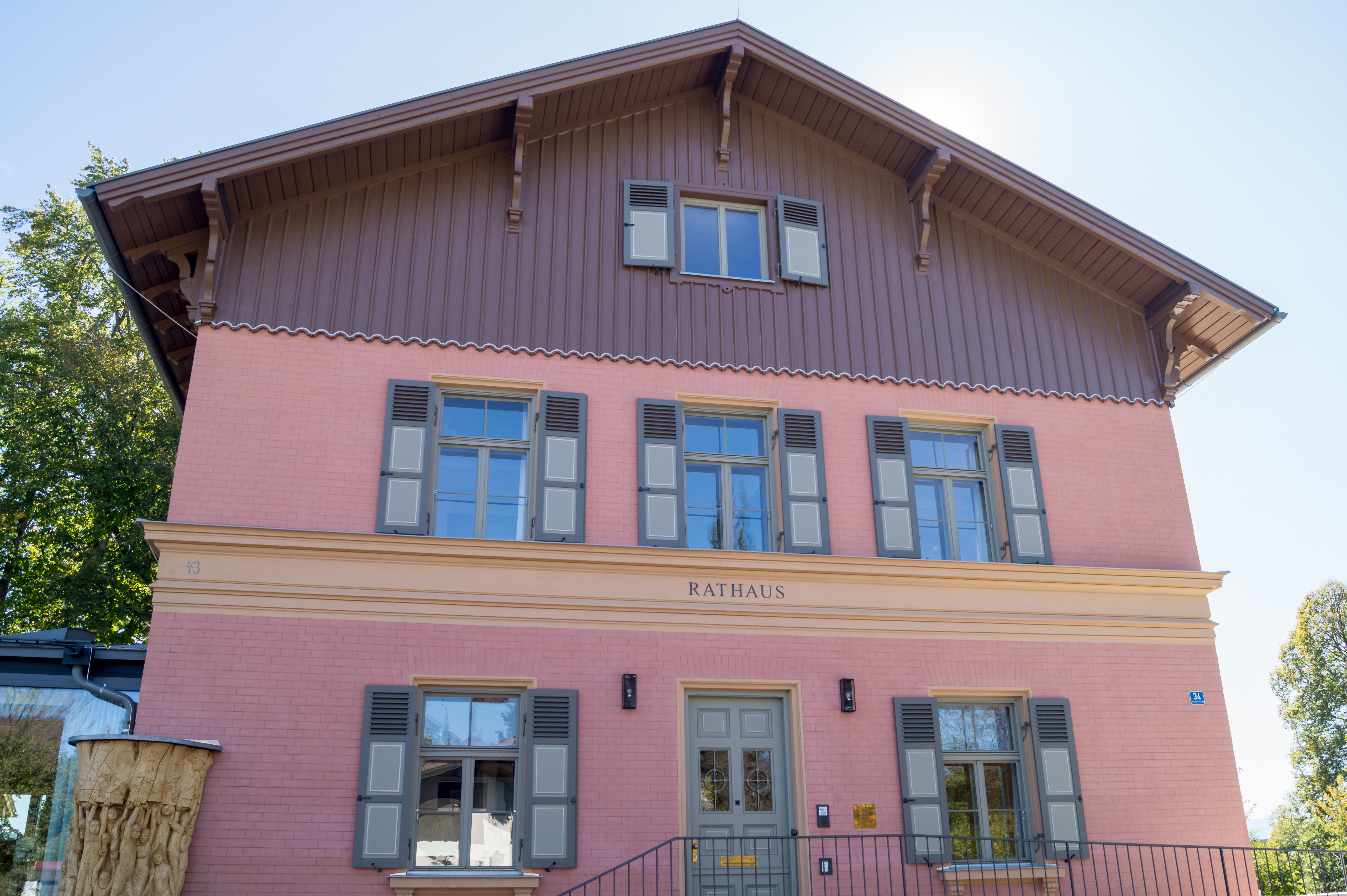 Fassade des Rathauses der Gemeinde Iffeldorf an der Staltacher Straße, sogenanntes „Deichstetterhaus“, von Nordwesten.